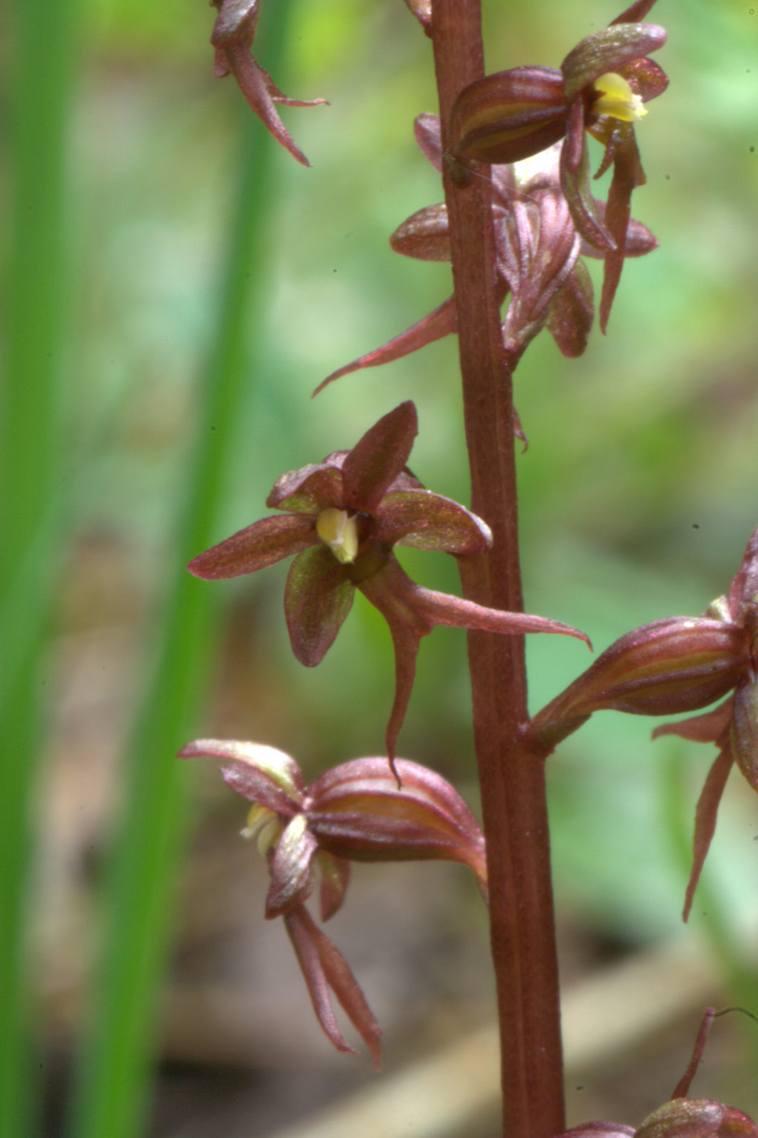 Зозулині сльози серцелисті (Listera cordata).